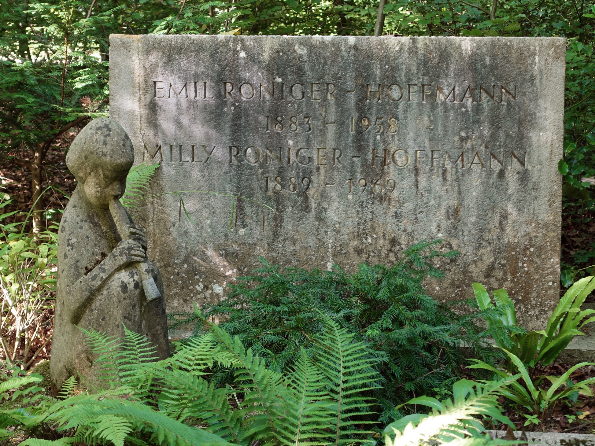 Grab auf dem Waldfriedhof Rheinfelden von Emil Roniger-Hoffmann (1883– 1958) Schriftsteller, Gründer des Rotapfel-Verlag, Mäzen, Kunst- und Autografen Sammler und seiner Frau Milly Roniger-Hoffmann (1889–1969).